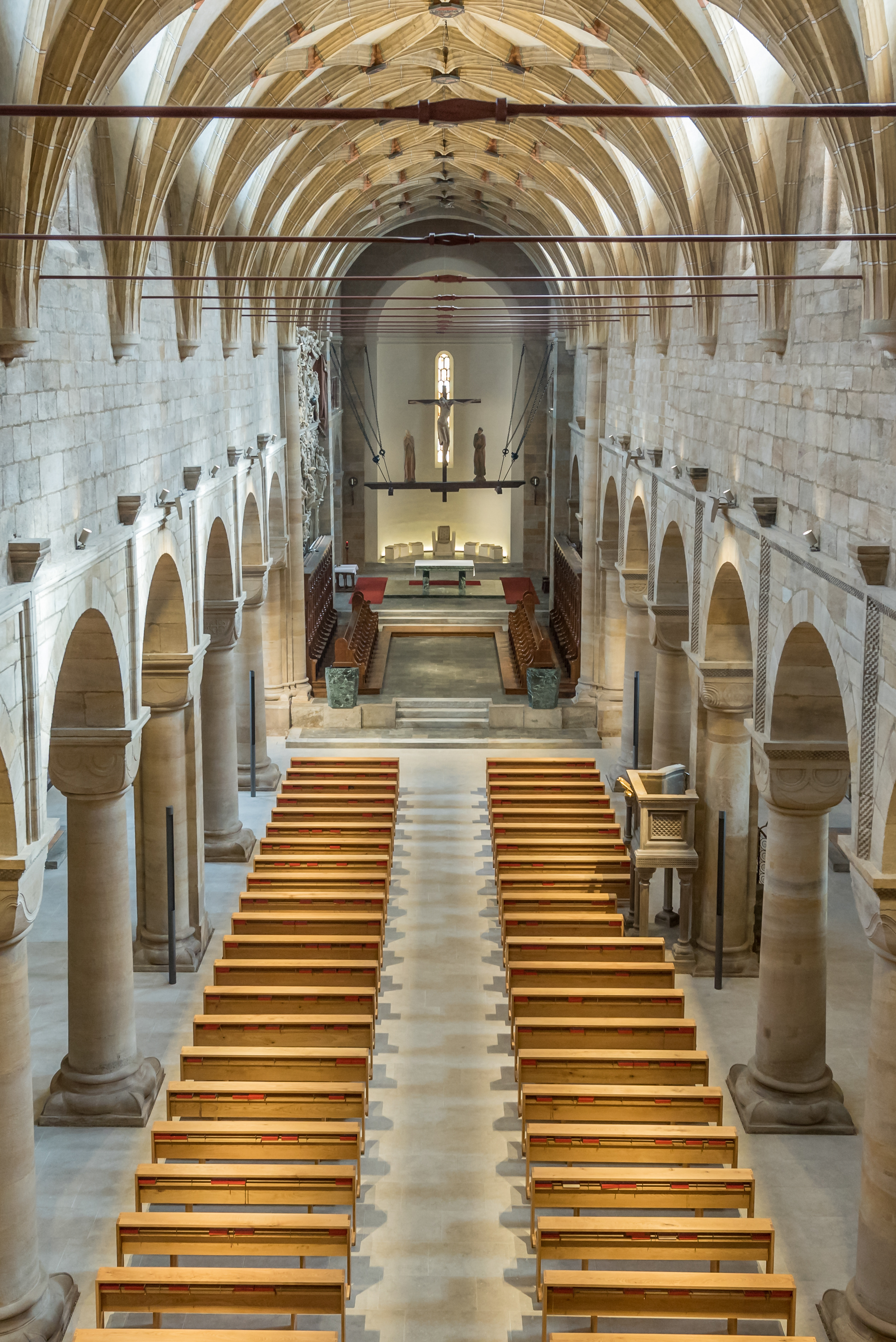 © Michael Regner